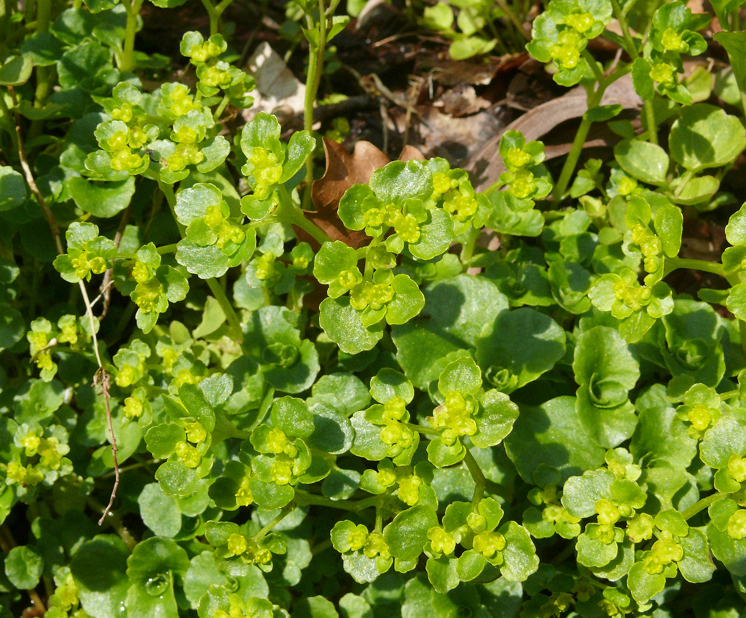 Chrysosplenium oppositifolium Deutschland - Schwäbisch-Fränkischer Wald